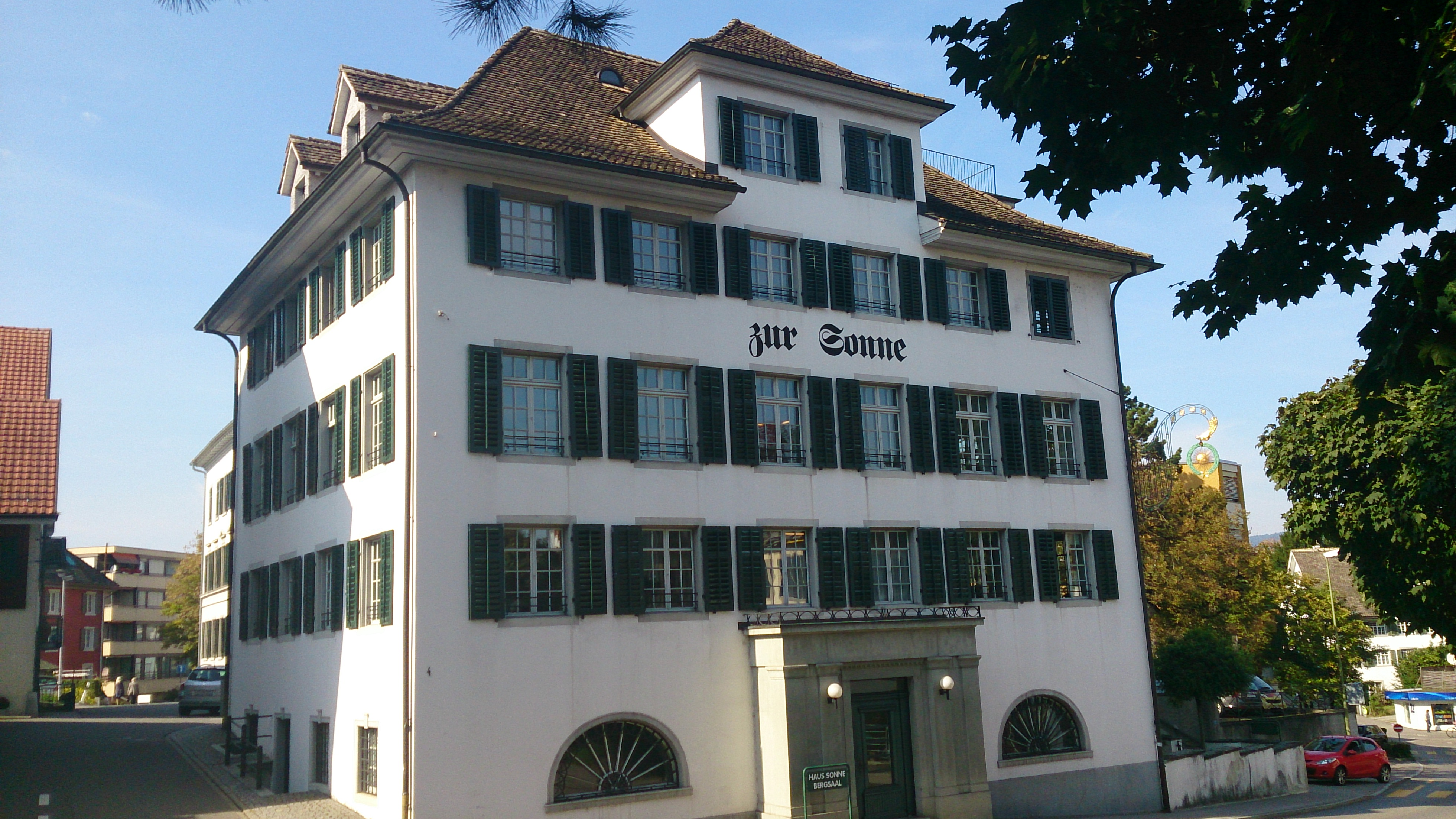 Haus zur Sonne (ehemaliges Gemeindehaus), Wädenswil, ID 14200476